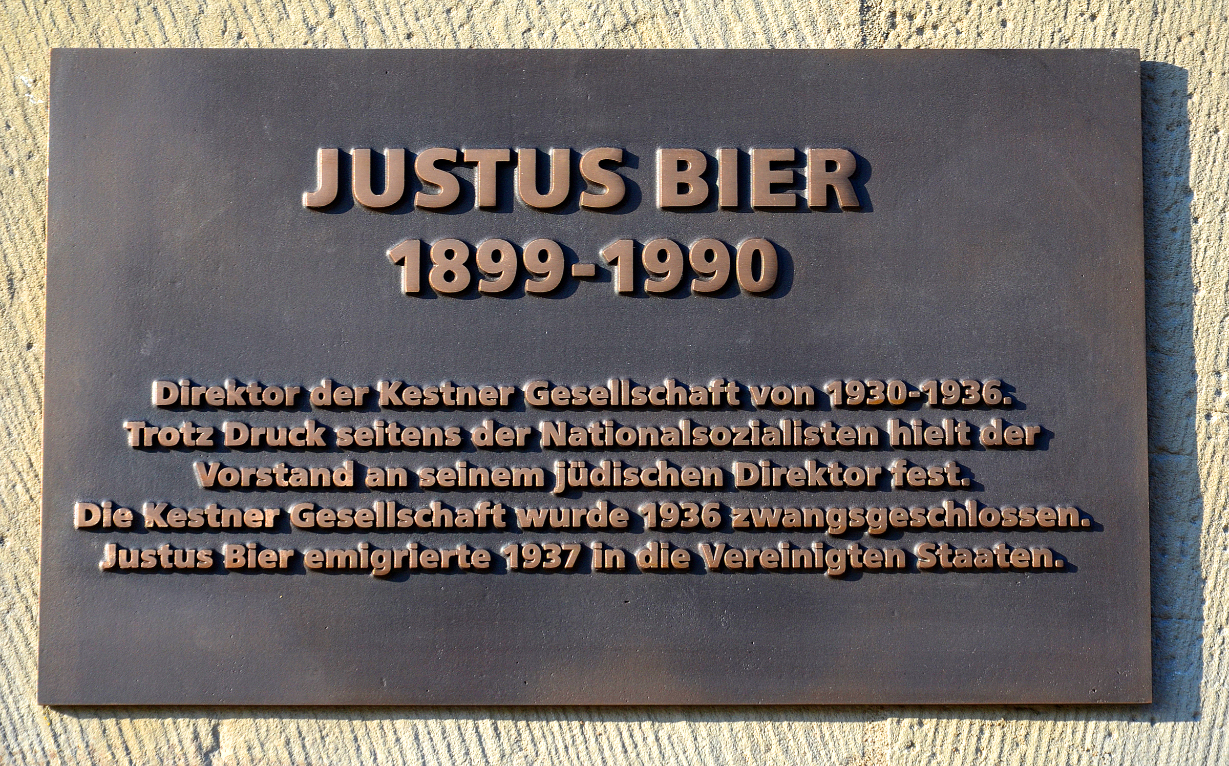 Im Jahr ihres 100. Gründungsjubiläums der Kestnergesellschaft enthüllte der Vorstandsvorsitzende Uwe H. Reuter und der niedersächsische Ministerpräsident Stephan Weil im November 2016 eine Gedenktafel an der denkmalgeschützten Fassade des ehemaligen Goseriedebades mit der erhabenen Inschrift „Justus Bier 1899 - 1990 Direktor der Kestner Gesellschaft von 1930-1936. Trotz Druck seitens der Nationalsozialisten hielt der Vorstand an seinem jüdischen Direktor fest. Die Kestner Gesellschaft wurde 1936 zwangsgeschlossen. Justus Bier emigrierte 1937 in die Vereinigten Staaten von Amerika.“ ...